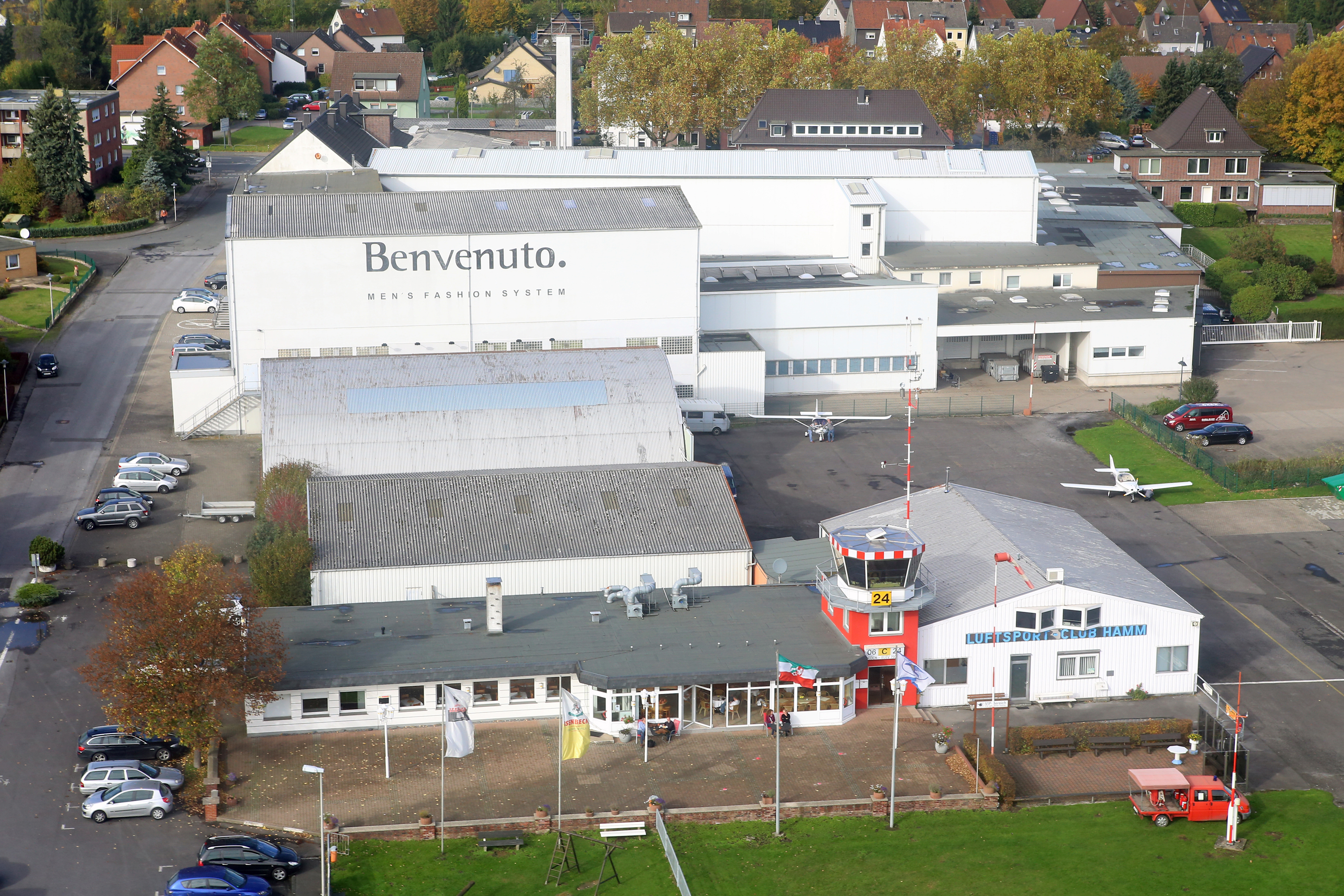 Luftbild Luftsportclub Hamm Flugplatz Benvenuto 2013